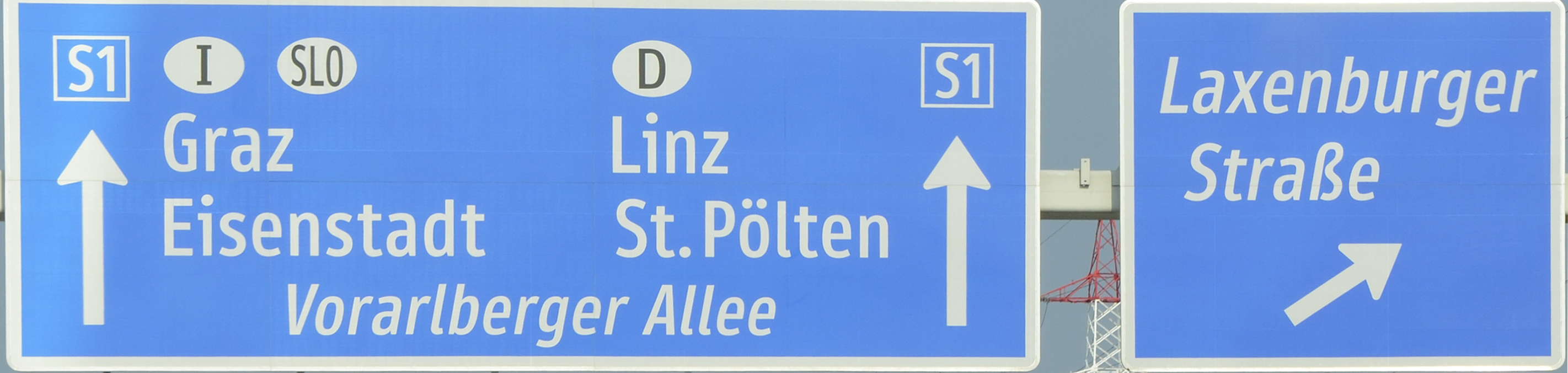 Die Verkehrsschilder über der S1 mit Schriftart "TERN"